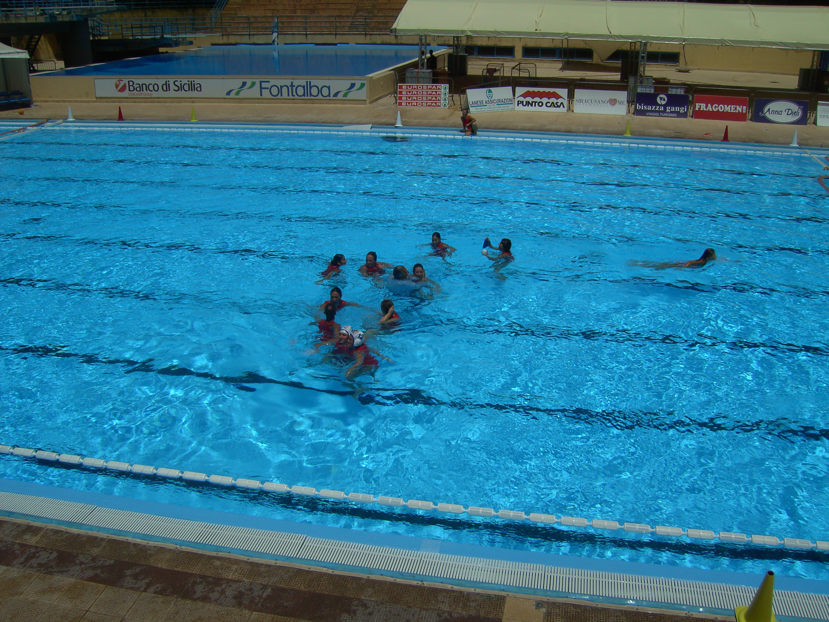 Esultanza delle giocatrici della Waterpolo Messina dopo la vittoria di gara3 contro Firenze e relativa promozione in A1